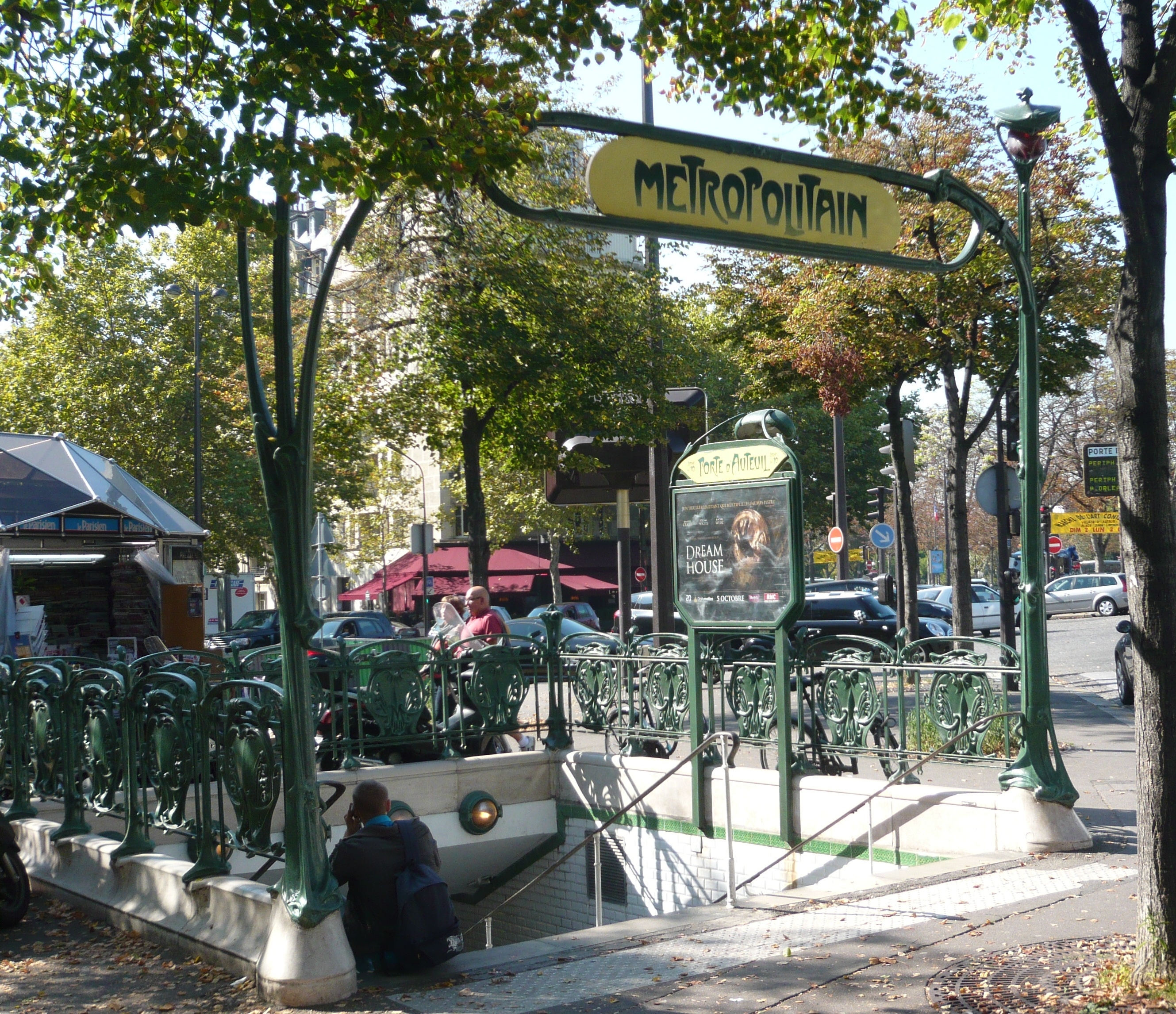 Édicule Guimard Station Porte d'Auteuil .